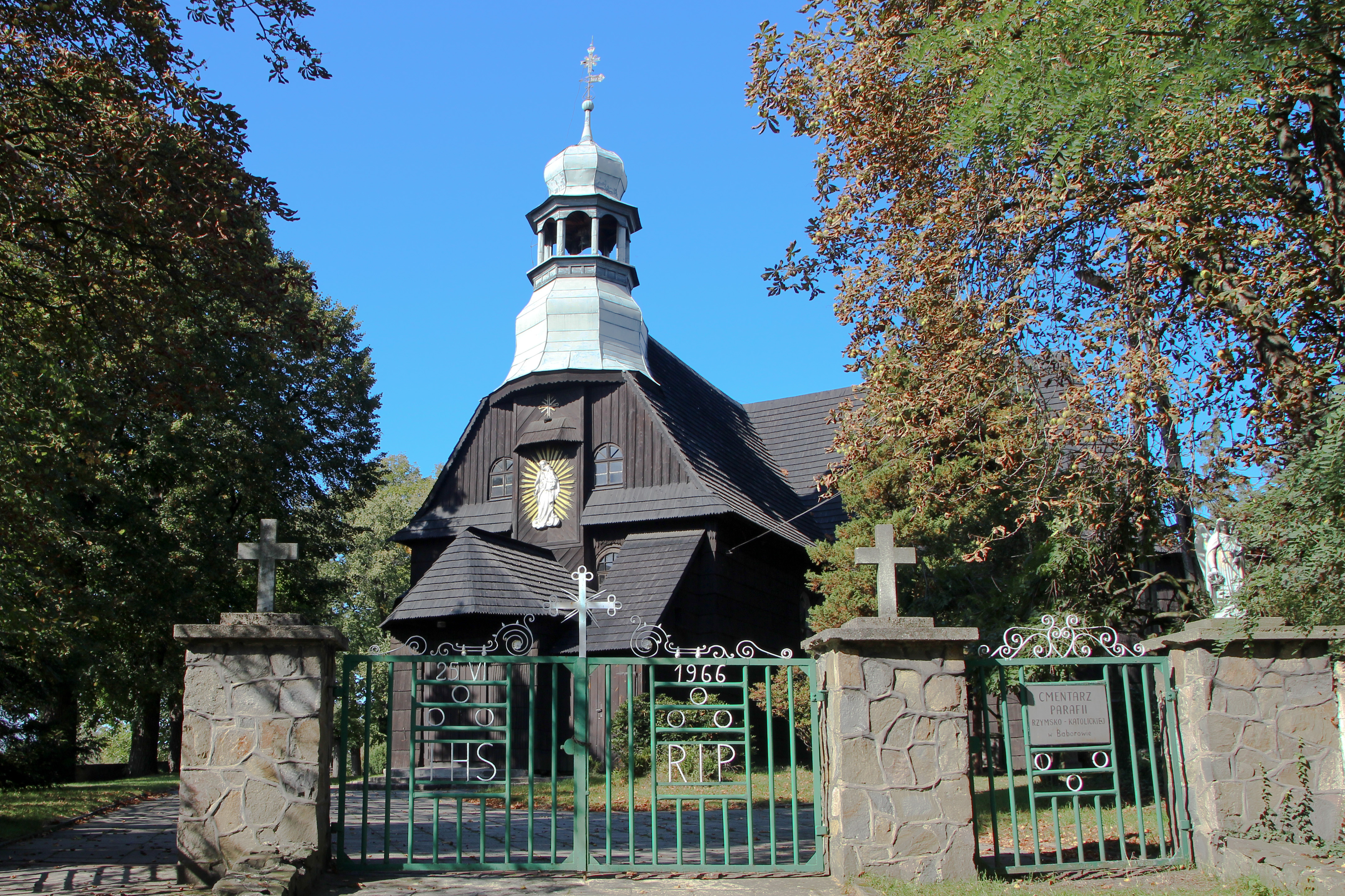 Baborów, ul. Kościuszki - kościół cmentarny p.w. św. Józefa, 1700-1702